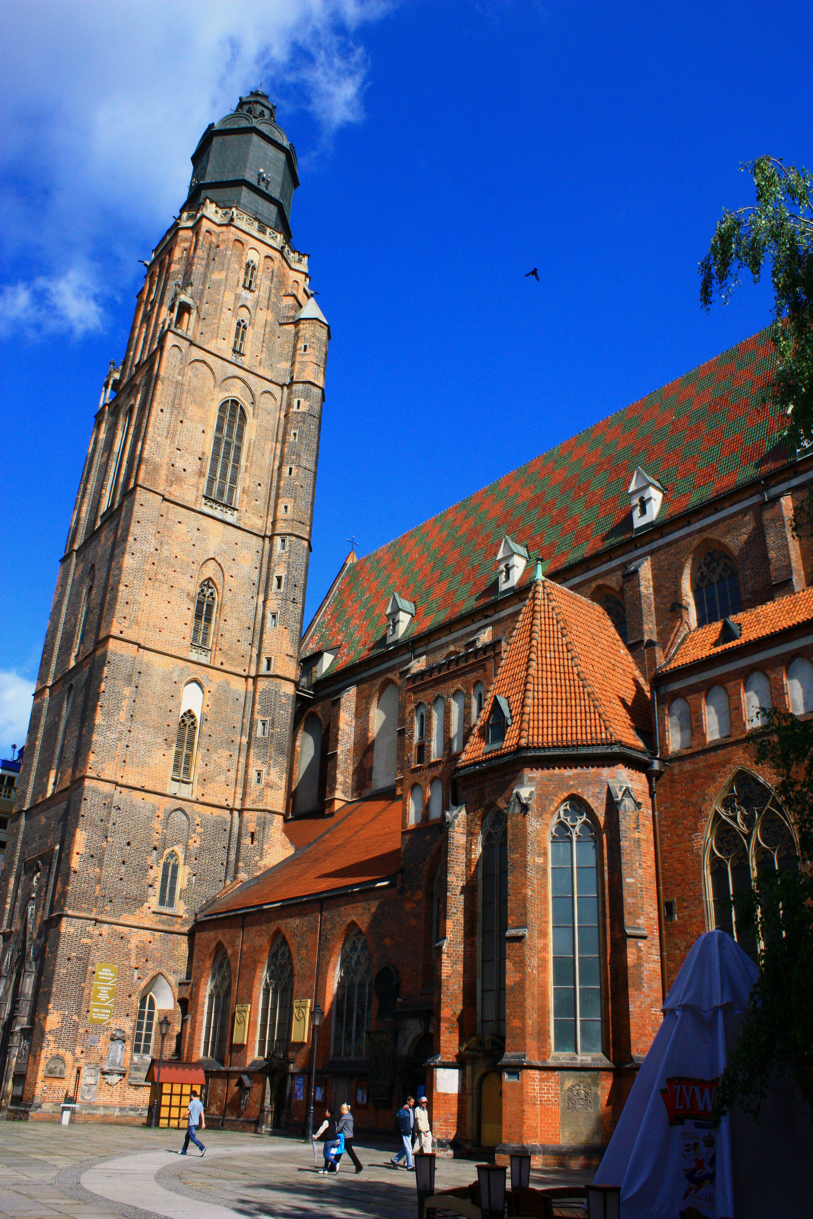 Wrocław, kościół par., ob. garnizonowy p.w. św. Elżbiety, 1 ćw. XIV, 1486